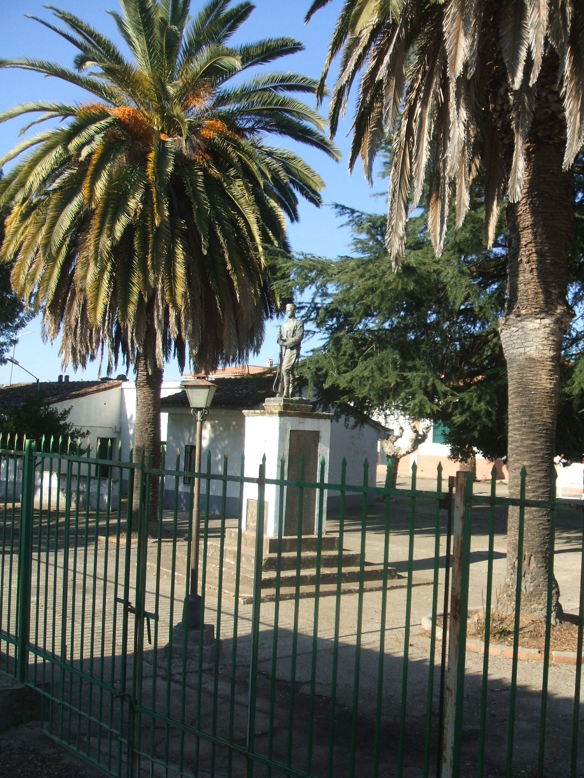 Villanueva de la Sierra (Cáceres) cuenta con una estatua en bronce del gran escultor valenciano Mariano Benlliure. Representa al soldado Inocencio Rubio, natural de la localidad que, en 1921, murió a la edad de 21 años en la batalla de Zoco Had, durante la Guerra de Marruecos. Fue mandada levantar por su padre el año 1927, en la finca que luego donó para la construcción de las Escuelas Públicas (las cuales llevaron en su recuerdo del nombre de "Grupo Escolar Inocencio Rubio").